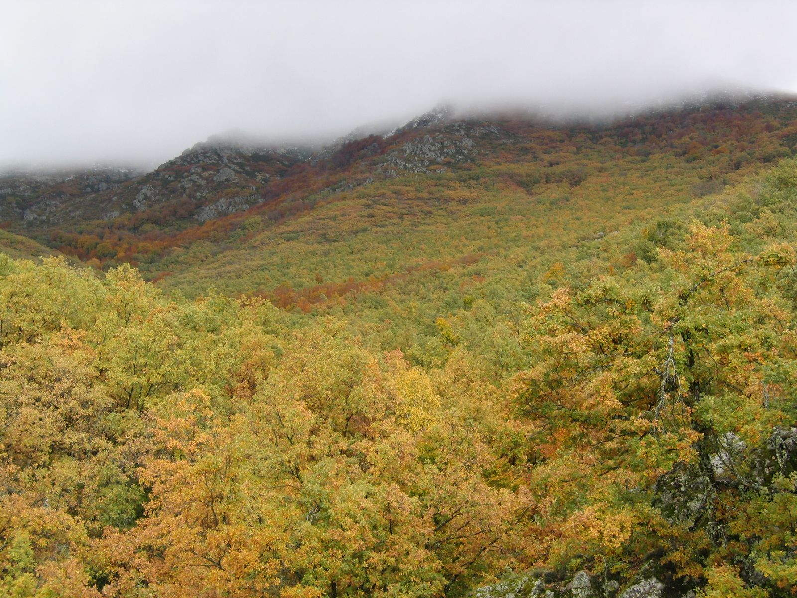 13056 Hayedo de la Pedrosa, Segovia